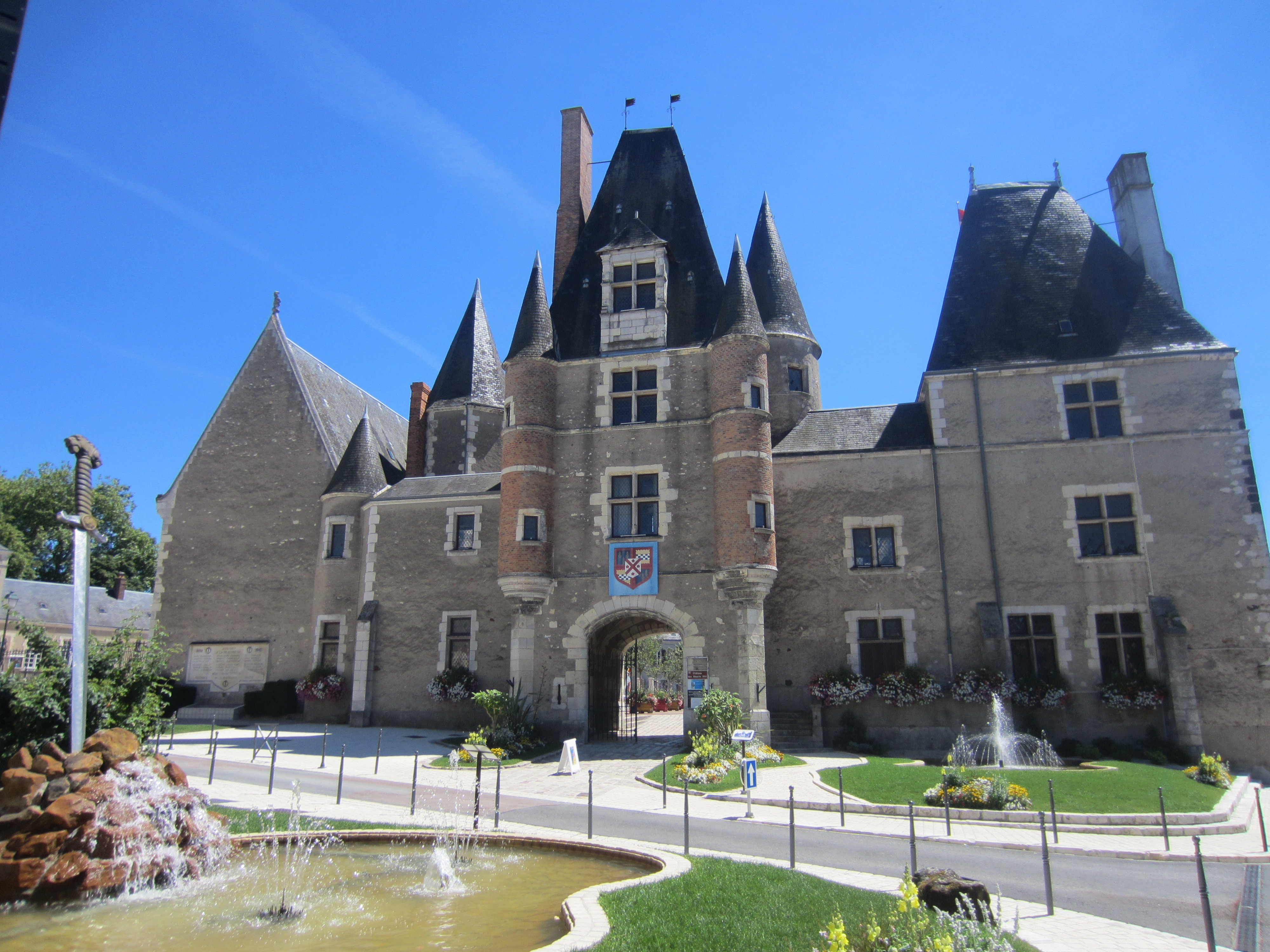 Château des Stuarts (enceinte de l'Hôtel de Ville) .